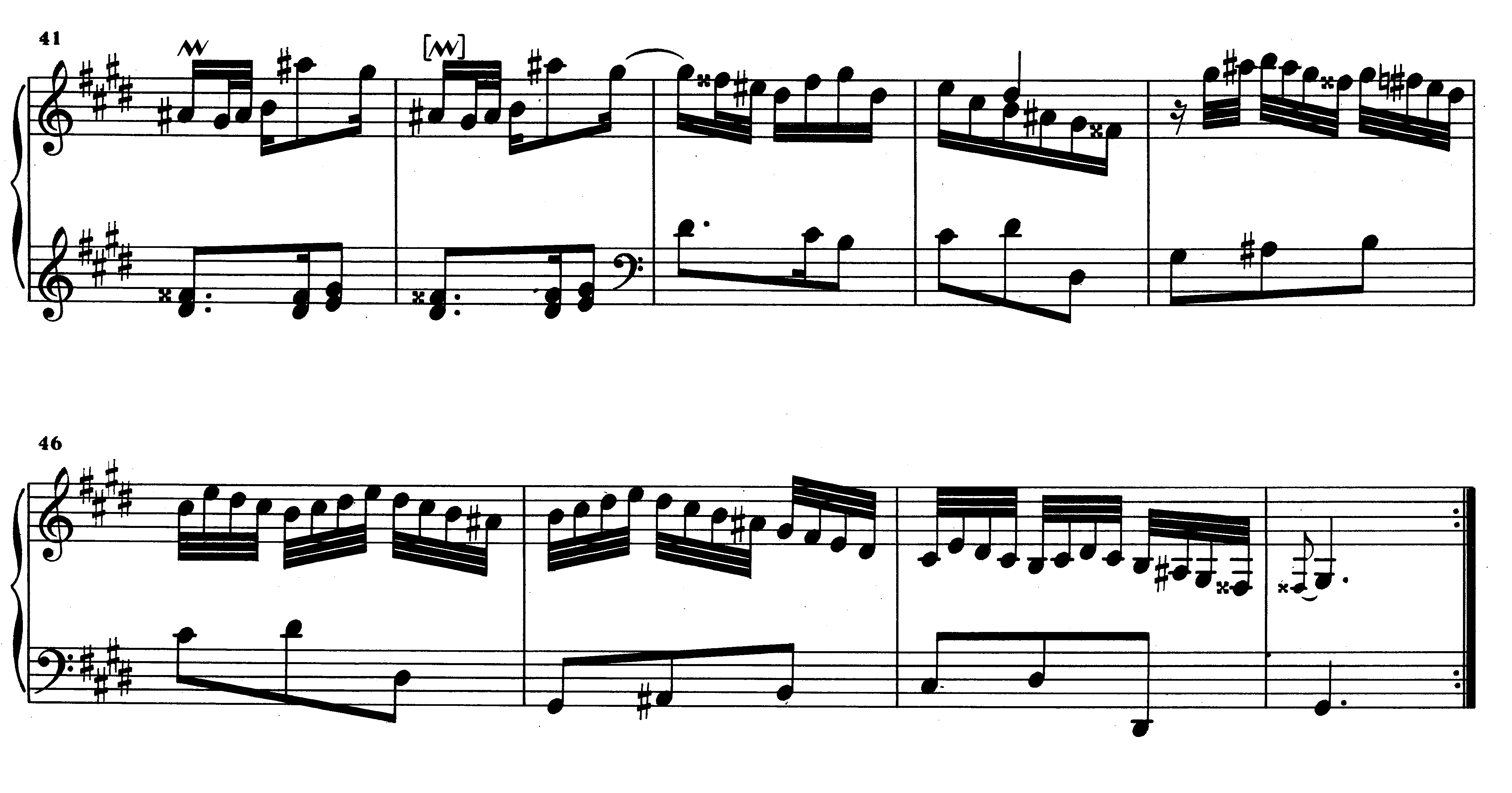 Darrers nou compassos de la primera part de la sonata K. 247 de D. Scarlatti. S'hi observa la cadència a Sol m (dominant respecte la tonalitat de l'obra).